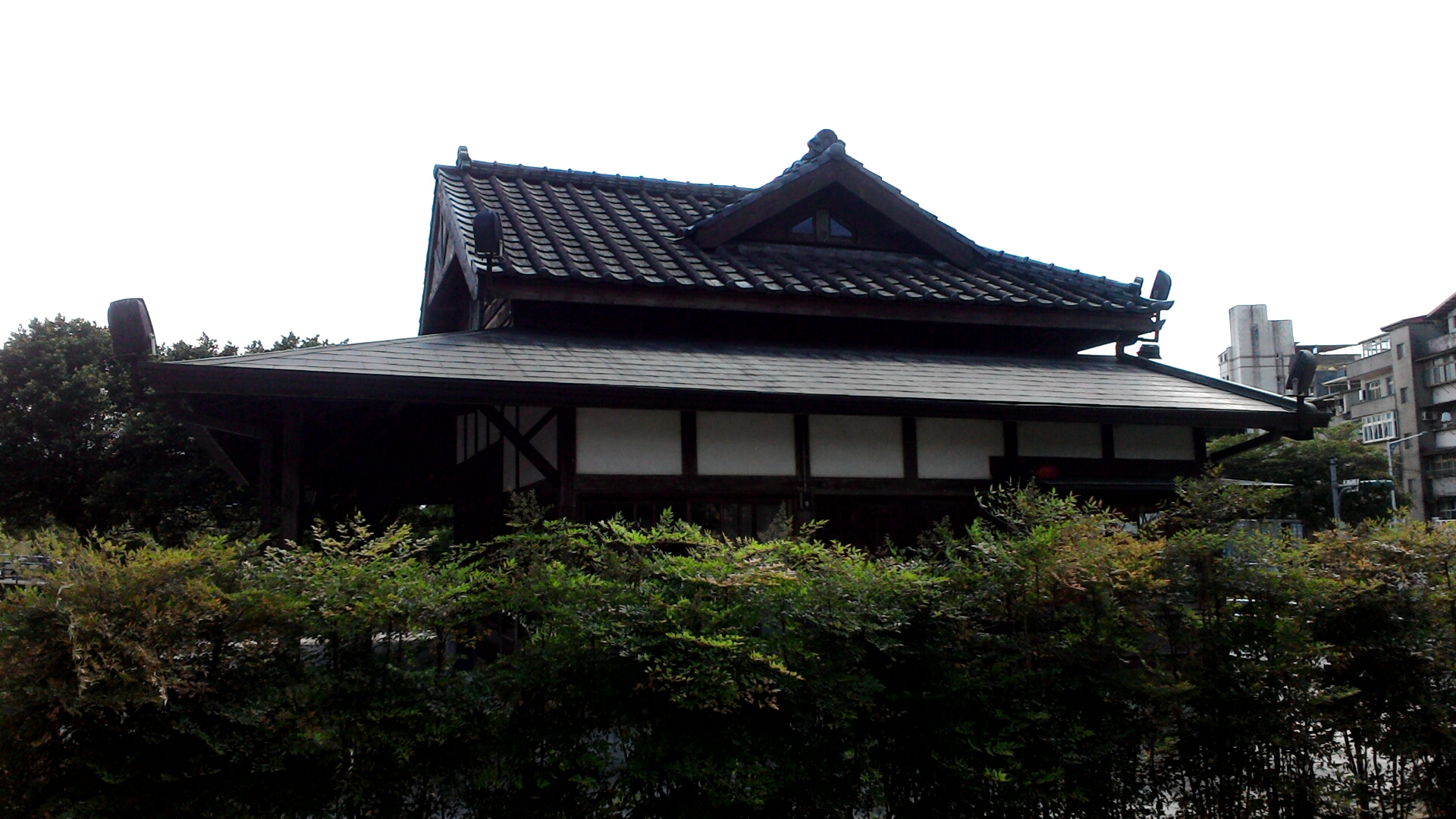 台鐵七堵前站舊站房側邊,基隆市七堵區長興里